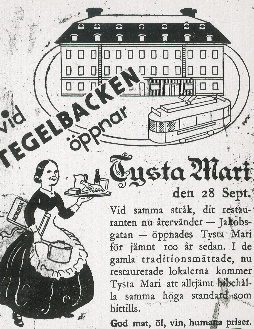 Tysta Mari flyttar till Tegelbacken, tidningsannons